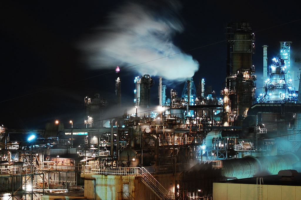 新日本石油精製室蘭製油所